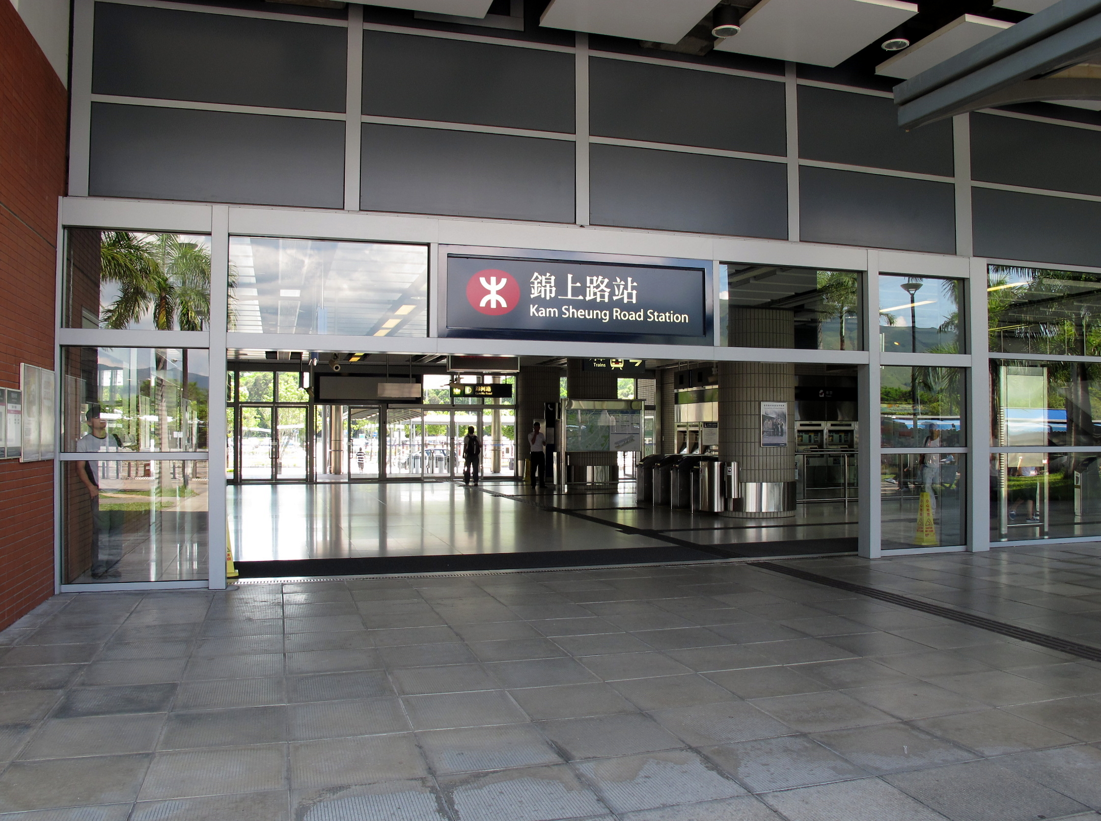 Kam Sheung Road Station Exit C